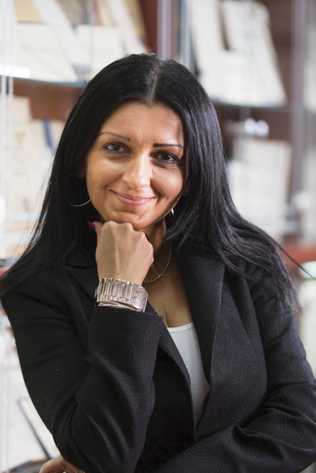 Српски (ћирилица): др Јелена Видић Трнинић